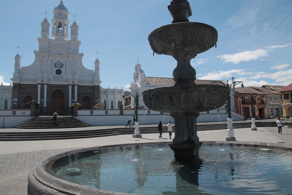 Iglesia y plaza central de Sangolquí, Cantón rumiñahui, Ecuador